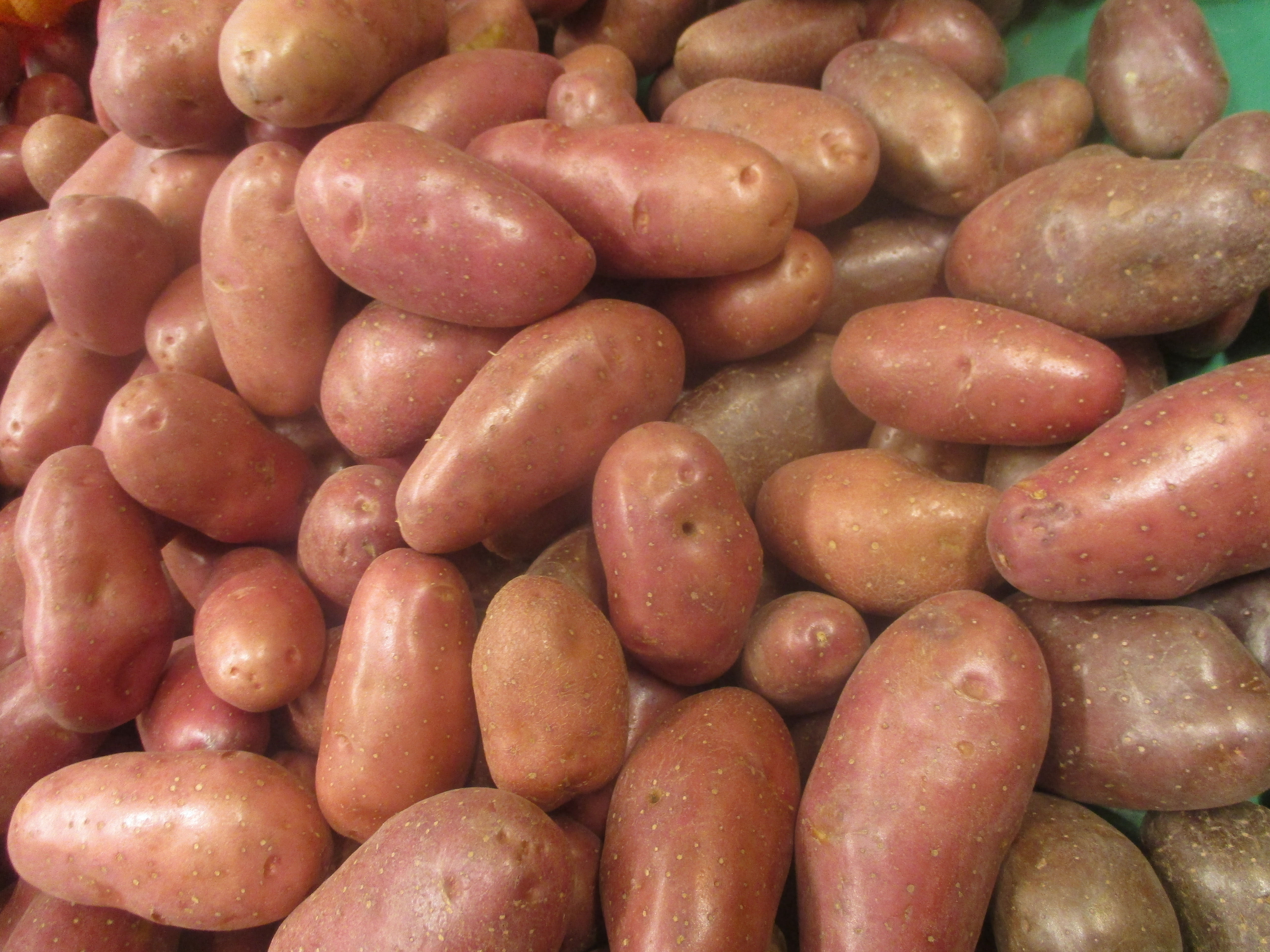 Pommes de terre Chérie en étalage en région parisienne.